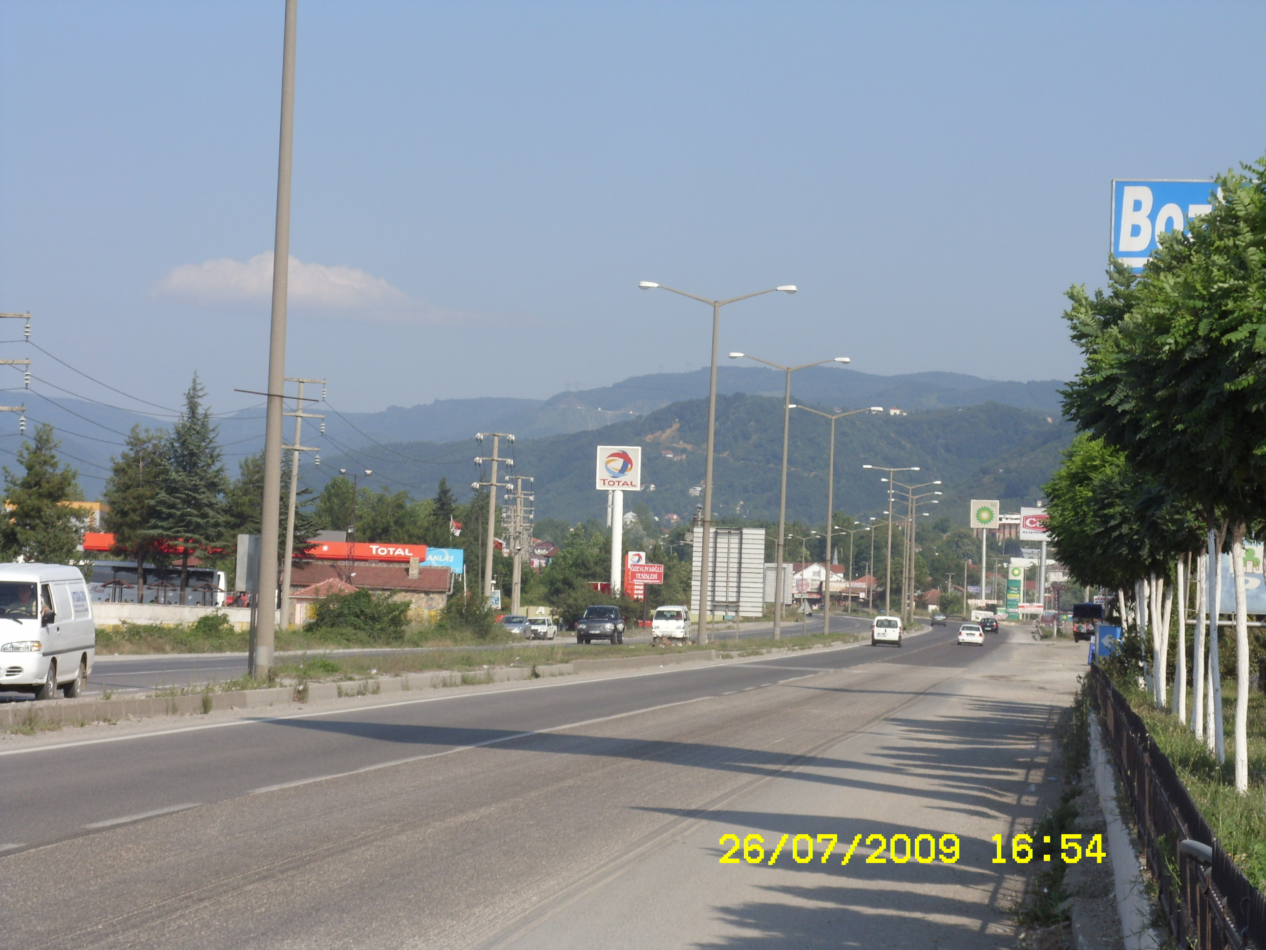 Kaynaşlı